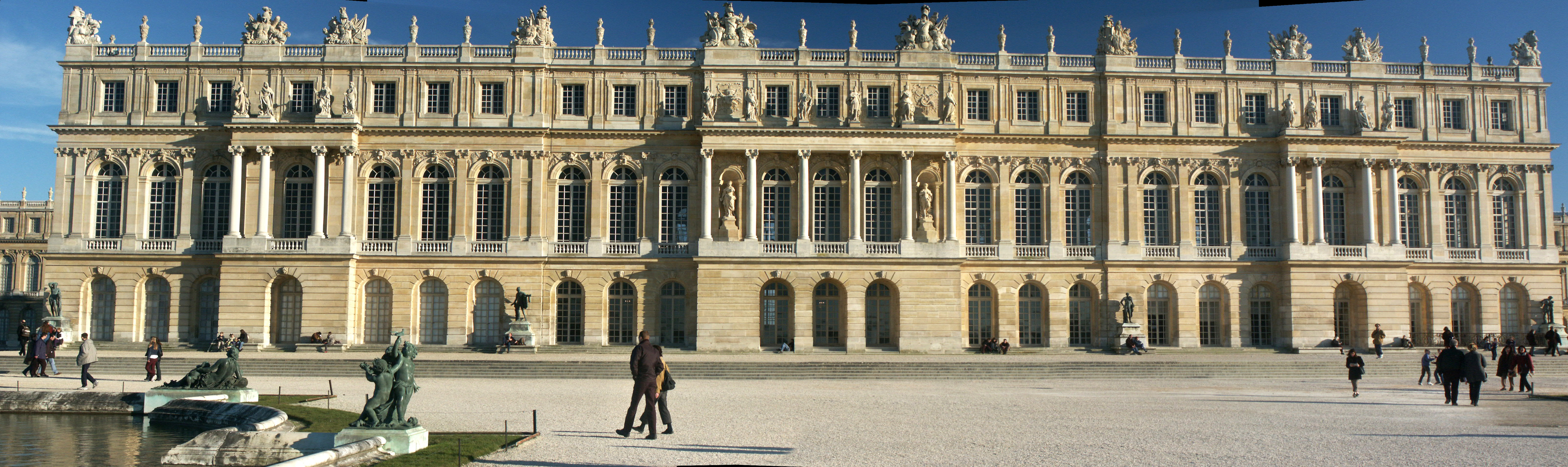 Facade du chateau de Versailles, vu du jardin